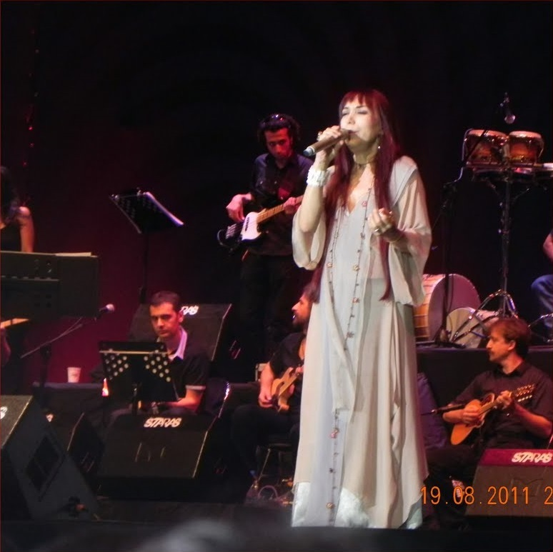 Leman Sam, Şevval Sam ve Şehnaz Sam'ın Kuruçeşme Arena'da verdiği aile konserinden görünüm. (20 Ağustos 2011)